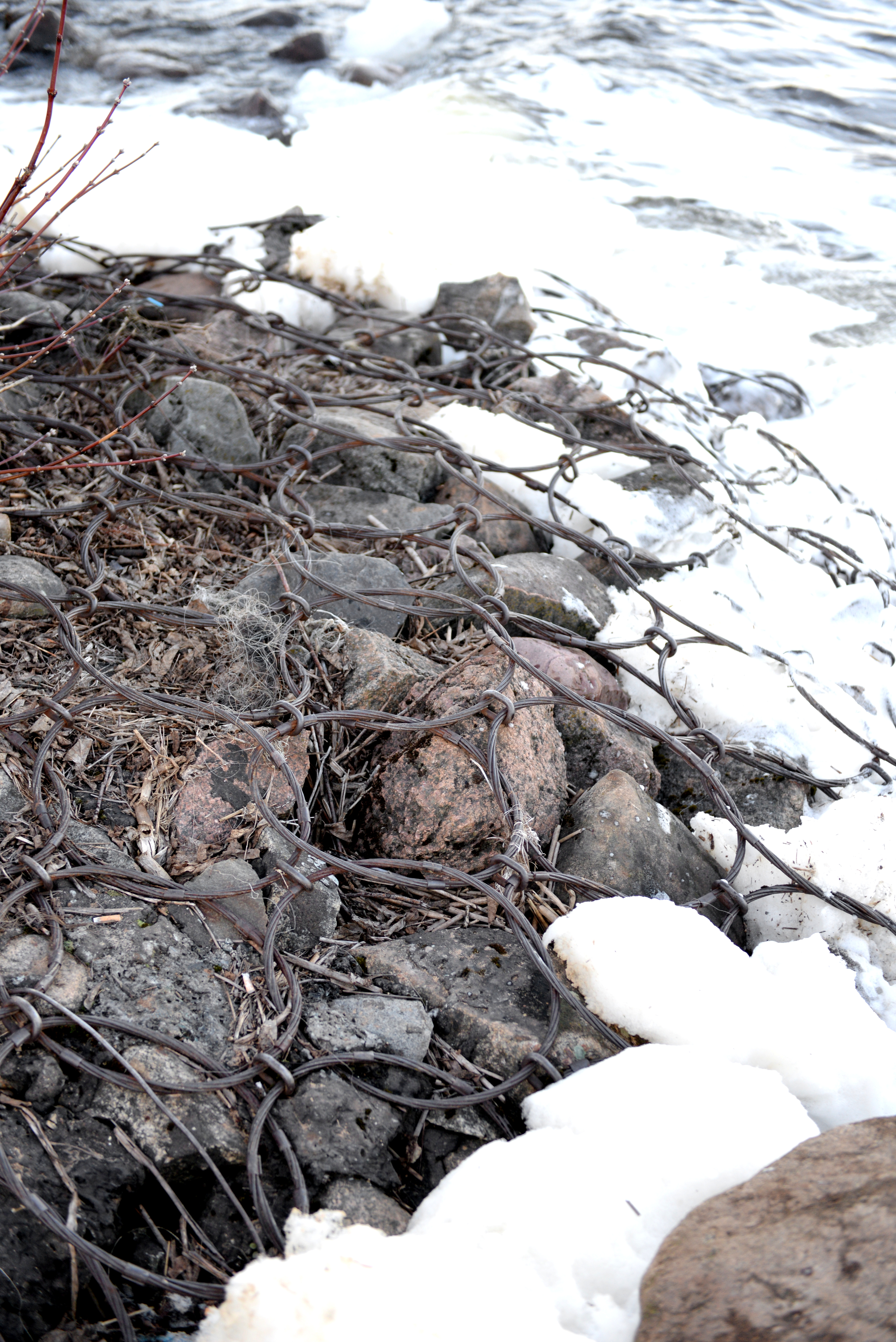 Противоторпедные сети, сохранившиеся до нашего времени с 1943 года.